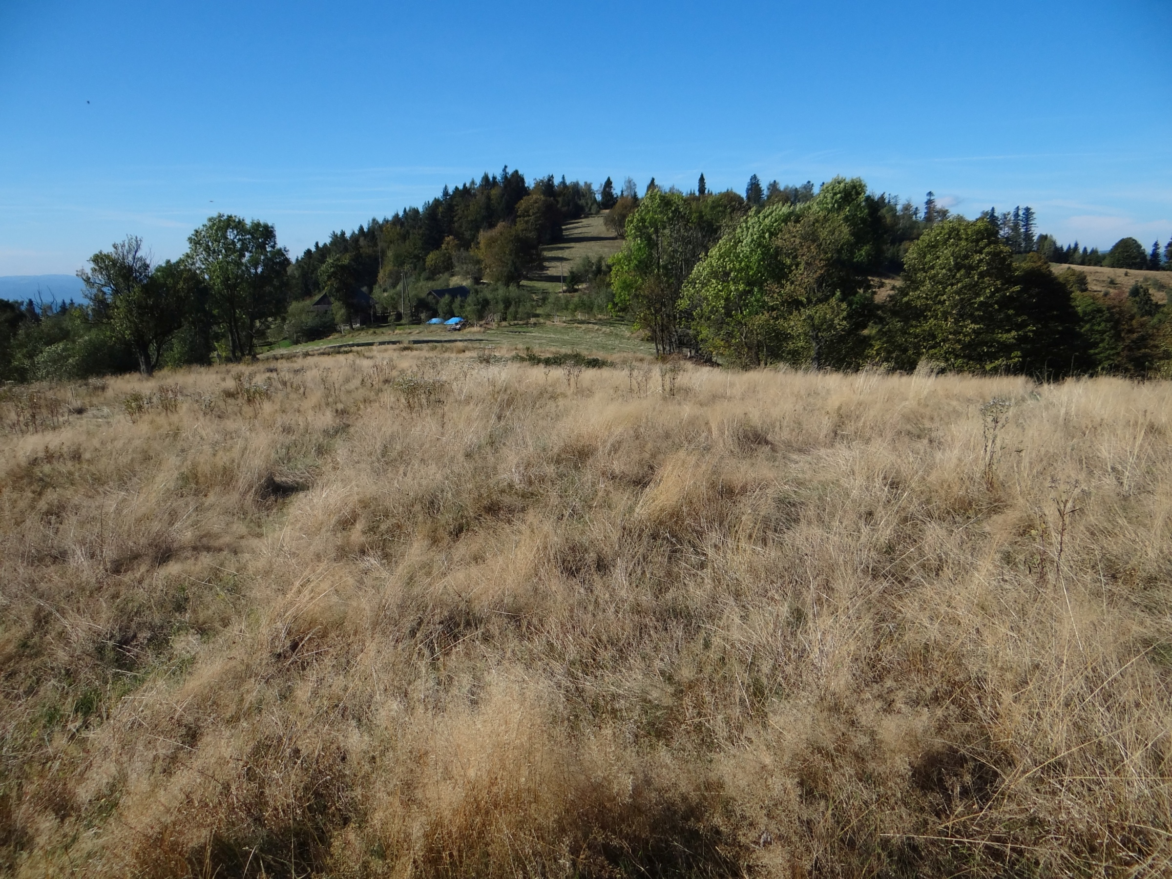 Gibasy. Widok na Gibasowe Siodło, Gibasową Chatkę i na Gibasówkę